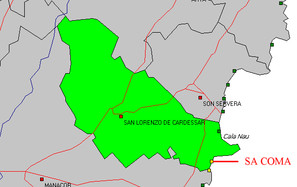 Sa Coma, Platja de Sant Llorenç, Sant Llorenç des Cardassar, Mallorca, Spain